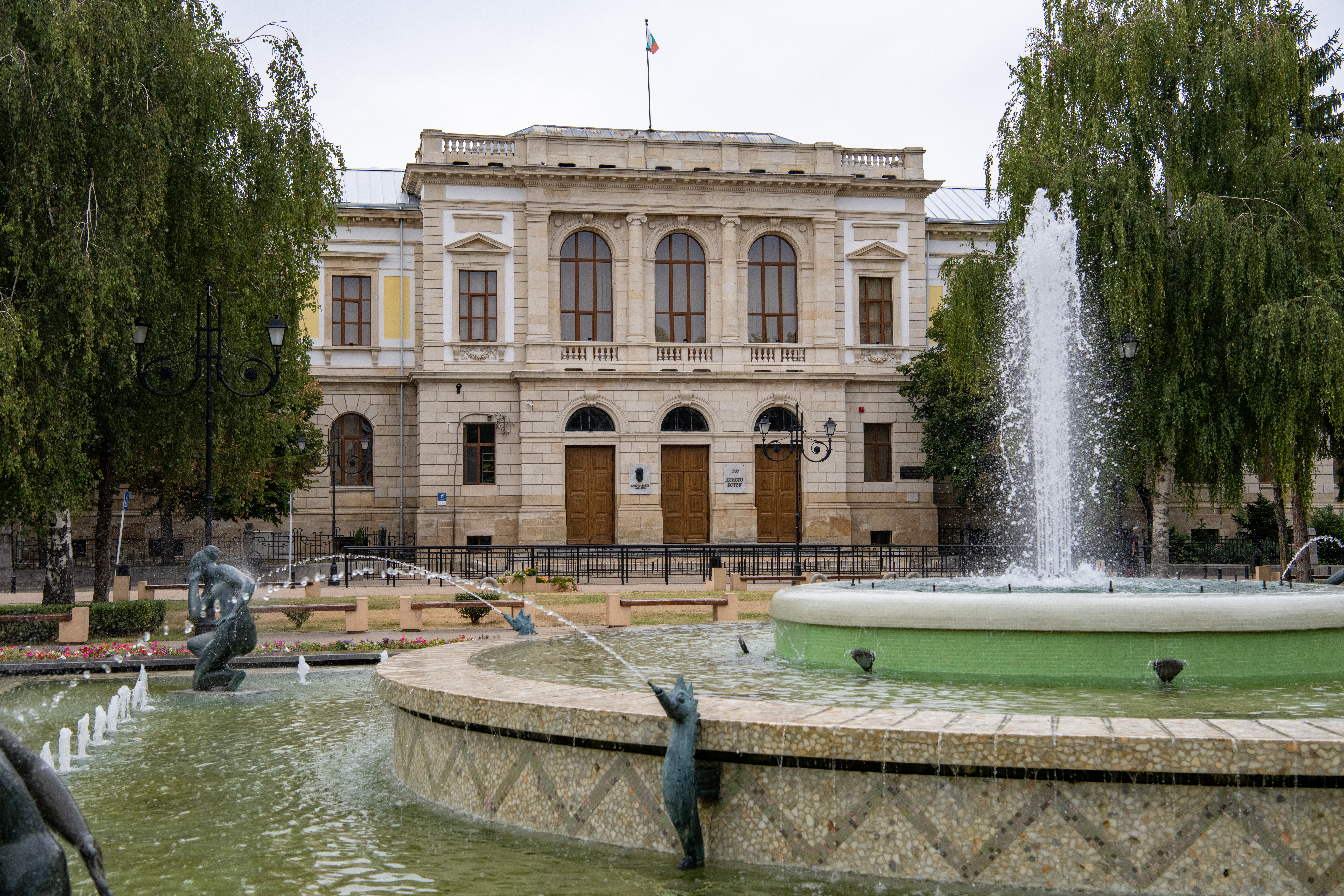 Снимката документира СОУ Христо Ботев в град Русе.